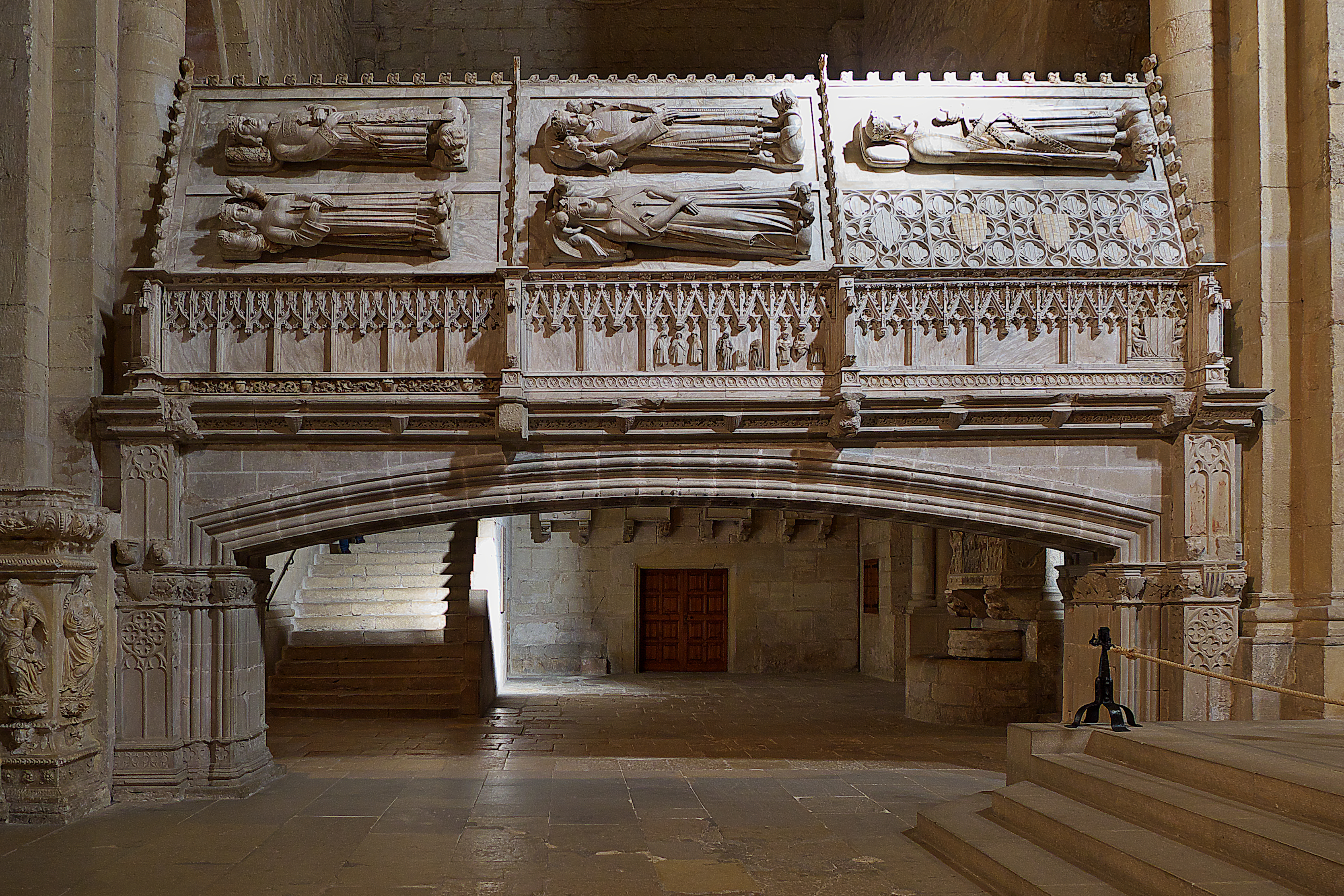 Alfonso II el Casto, eligió al Monasterio de Poblet como panteón real de la Casa de Aragón. Sepulcros en la nave del Evangelio. Fernando I de Aragón, su esposa Leonor Urraca de Castilla; Pedro IV de Aragón y sus esposas Leonor de Portugal, María de Navarra y Leonor de Sicilia, y Jaime I de Aragón.